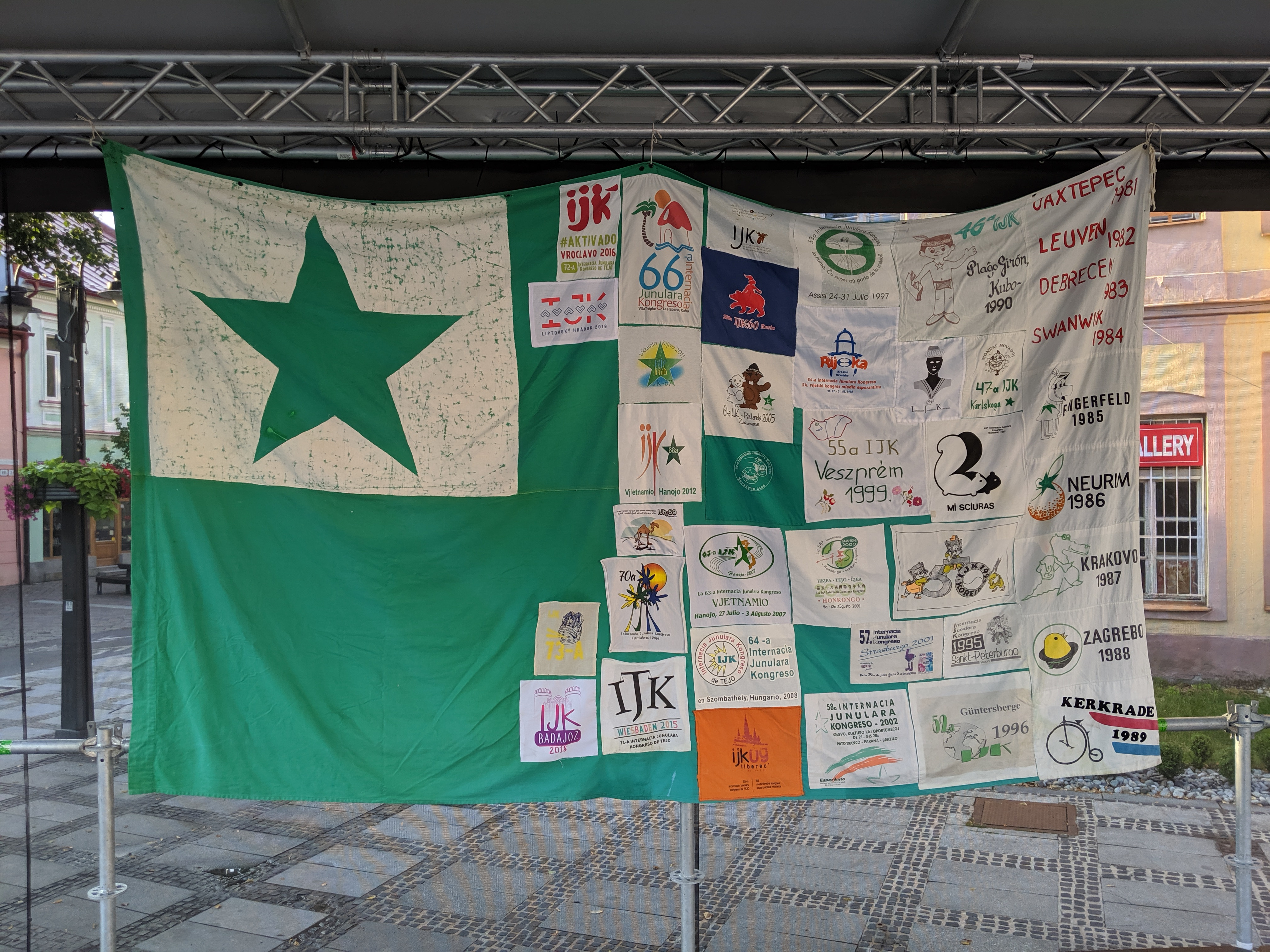 La IJK-flago dum IJK 2019 en Slovakio.